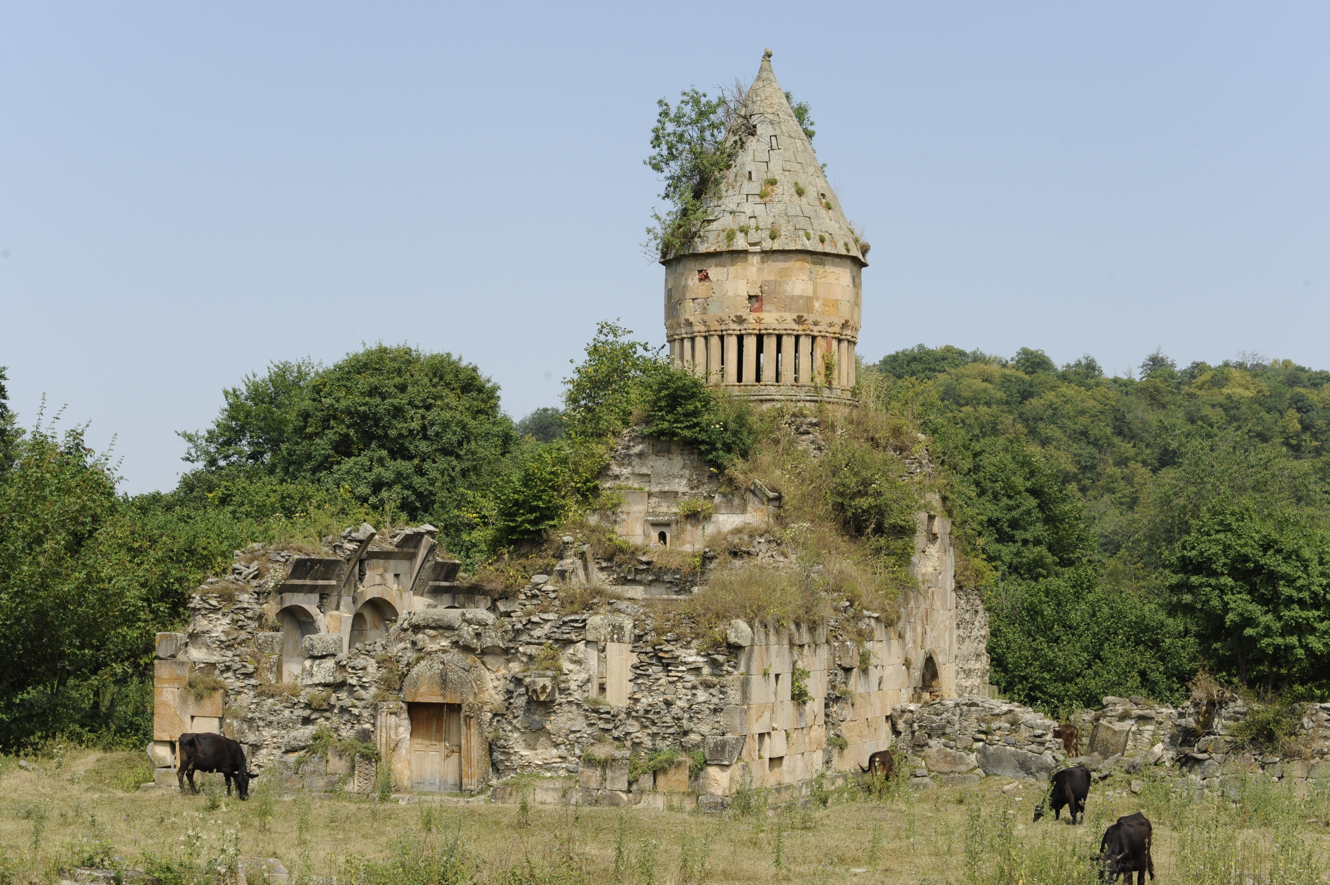 Խորակերտ վանական համալիր - ՀՀ պատմամշակութային արգելոց-թանգարանների և պատմական միջավայրի պահպանության ծառայություն ՊՈԱԿ 94/12